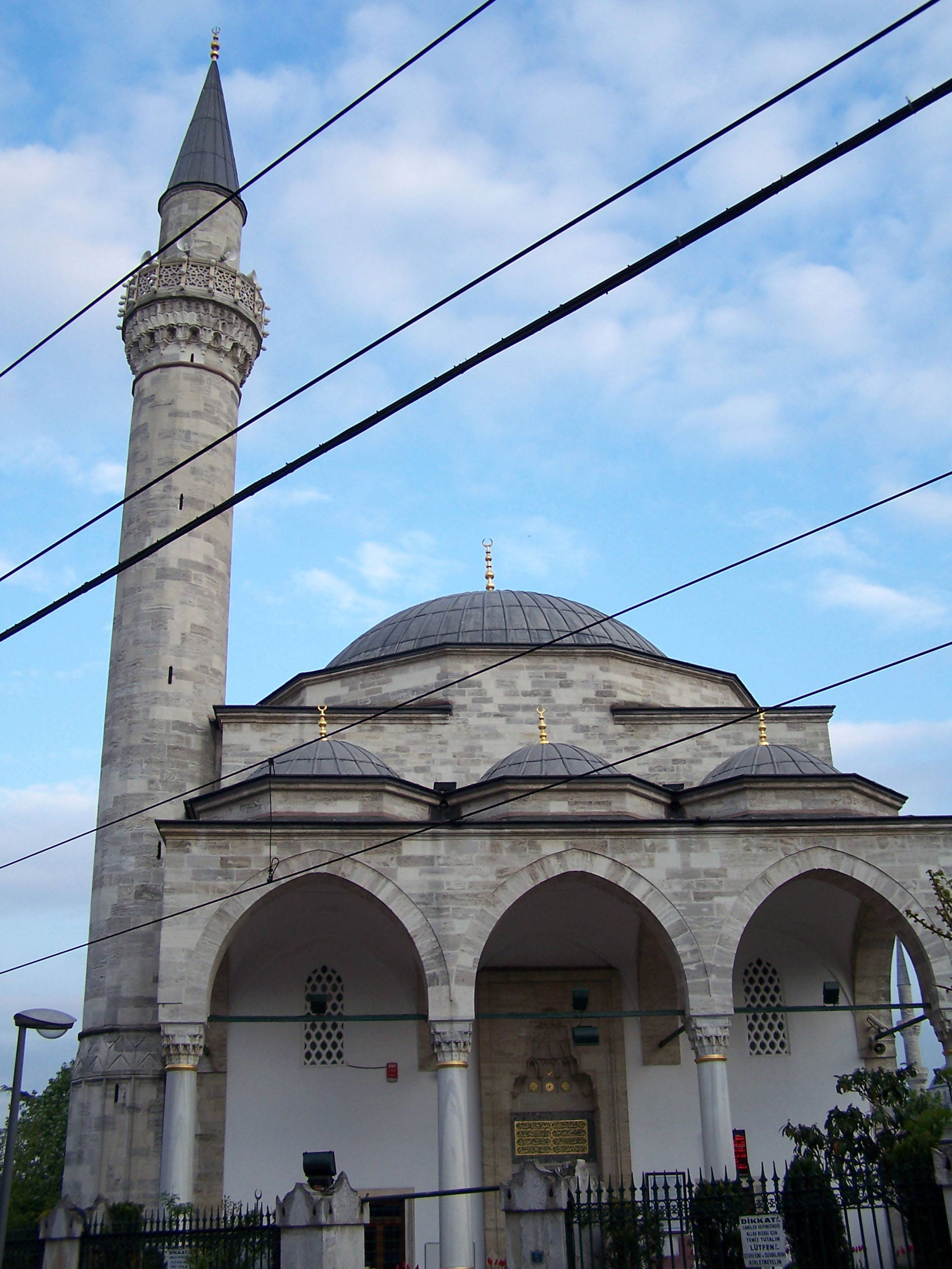 Firuz Ağa Camii